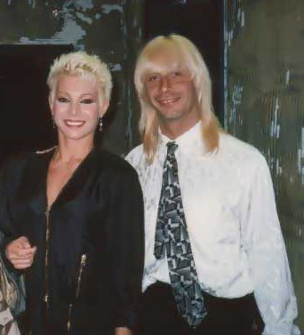 Carmen Russo ed Enzo Paolo Turchi al Majorca di Codogno (LO) Italy